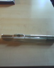 La testata di un flauto traverso.